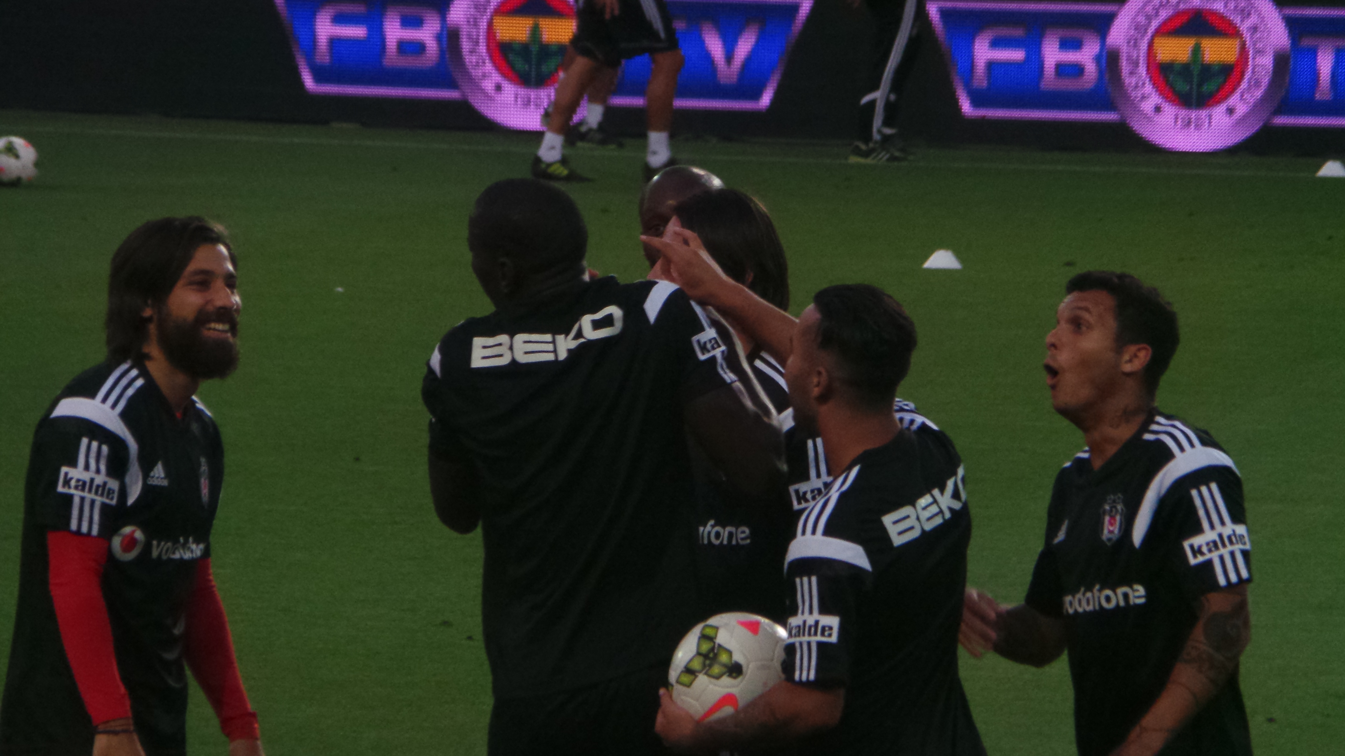 Olcay, Ba, Frei, Hutchinson, Motta